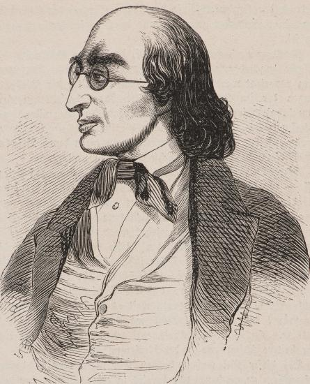 Ludwig Hassenpflug; aus: Leipziger Illustrirte Zeitung, 1850, S. 293